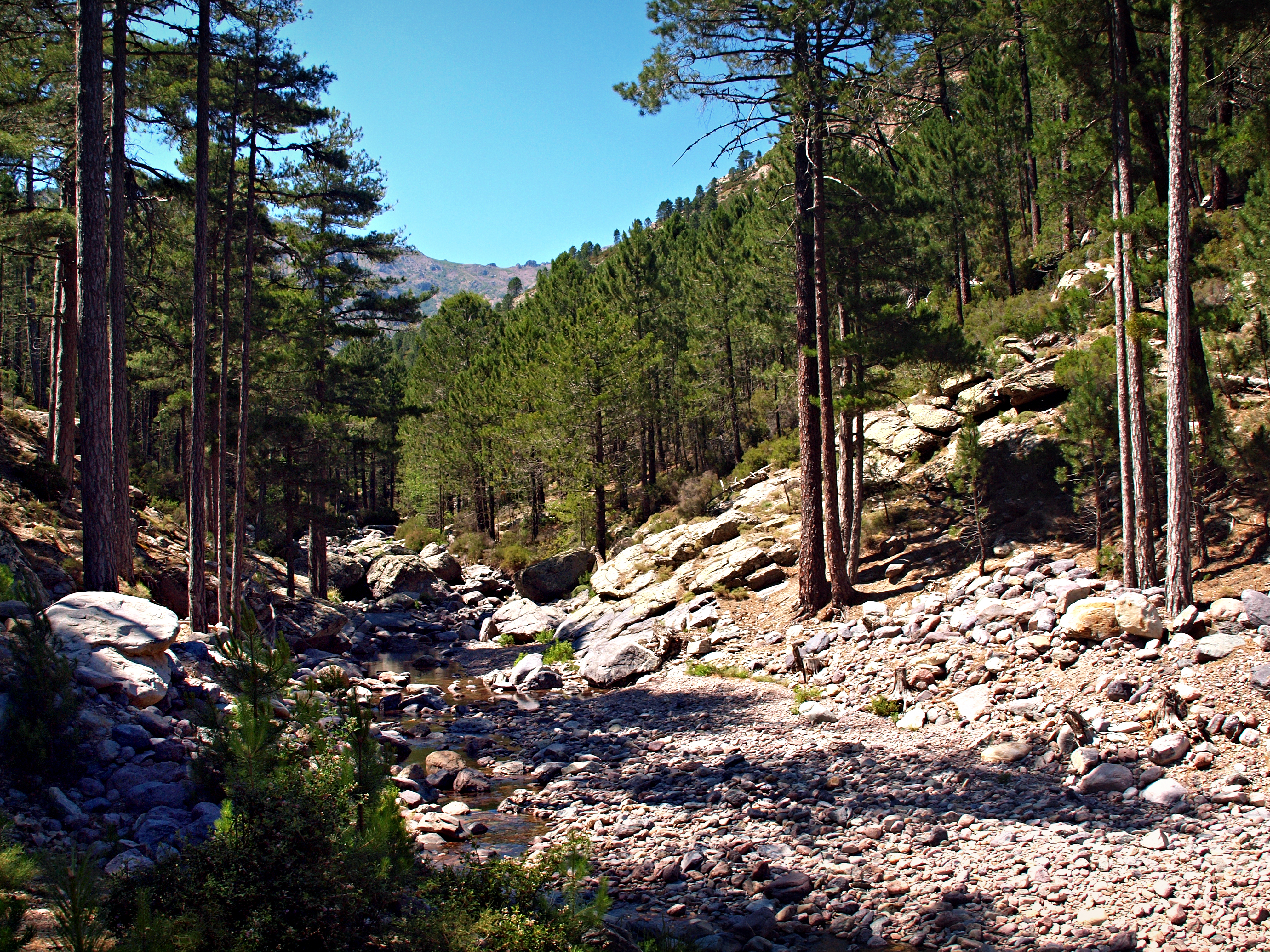 Asco, Vallée d'Asco (Corse) - Ruisseau de Tassineta en amont de sa confluence avec le ruisseau de Stranciacone (en aval la rivière d'Asco)